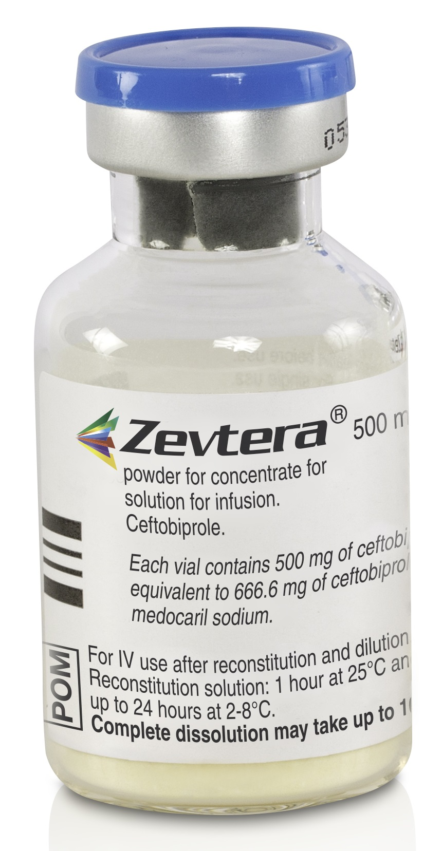 Zevtera_1Vial_UK[3][1]